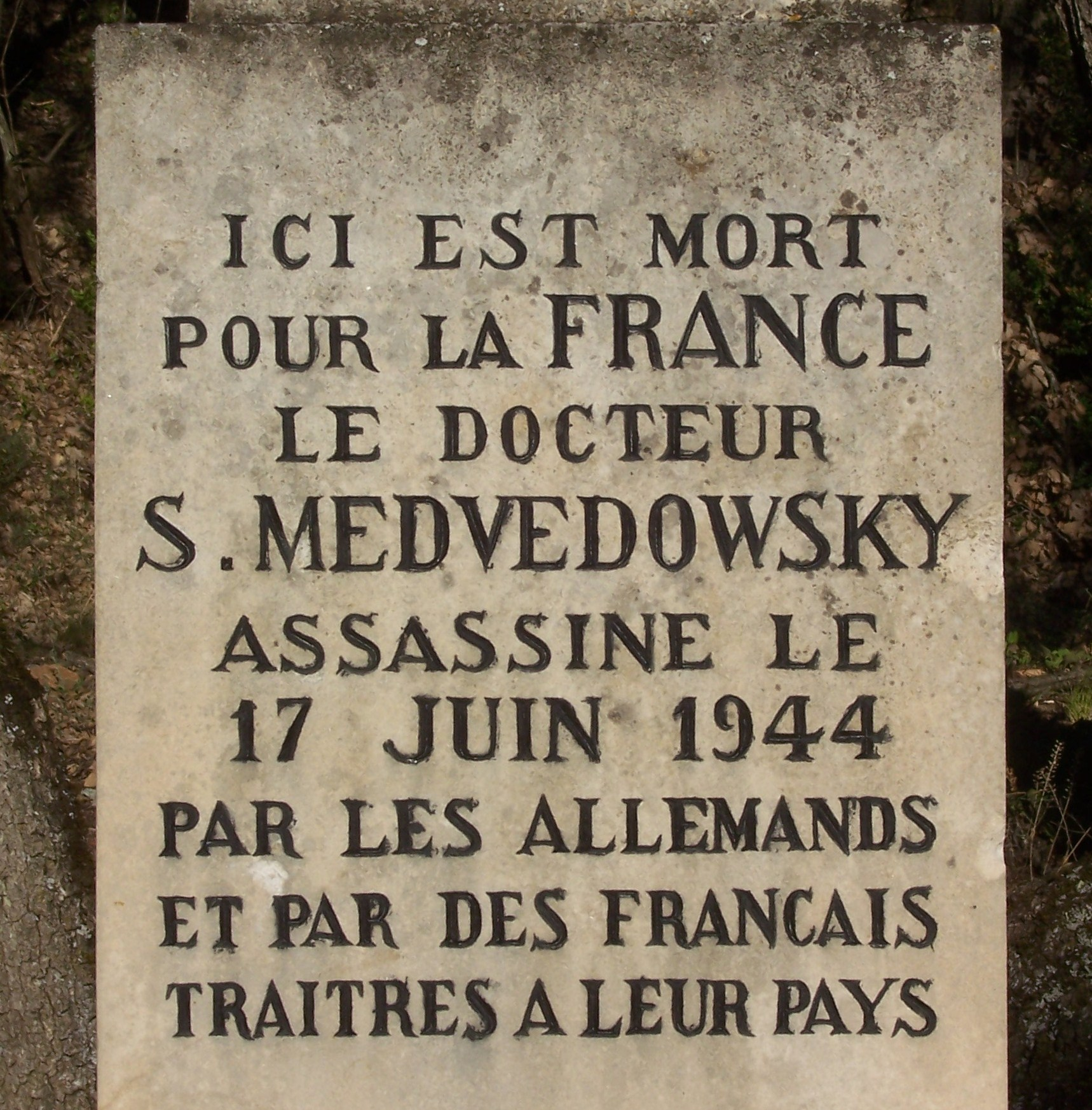 stèle à la mémoire du docteur Medvedowski assassiné par les miliciens